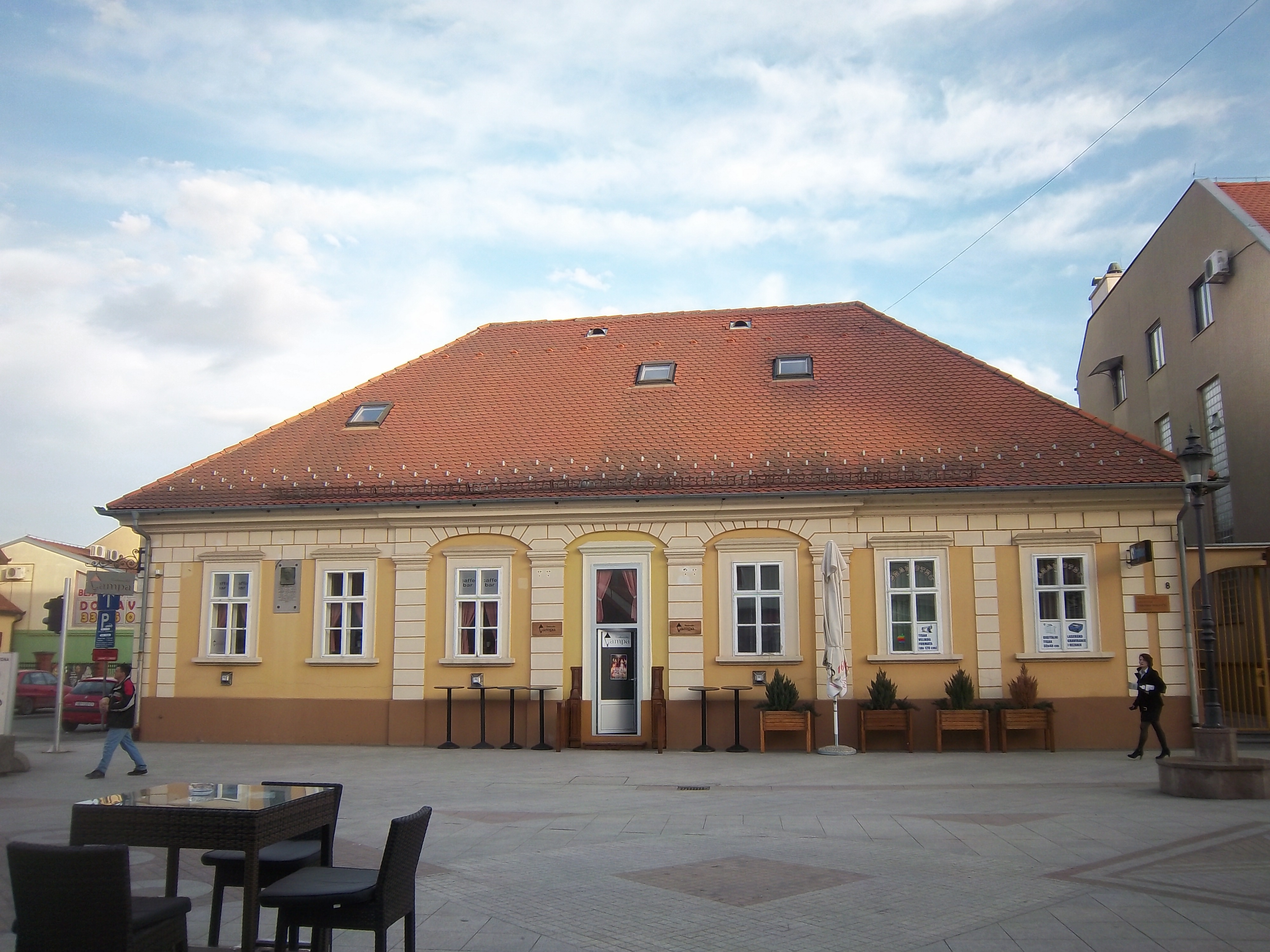 Srpskohrvatski / српскохрватски: Vinkovci u istočnoj Hrvatskoj (centar).